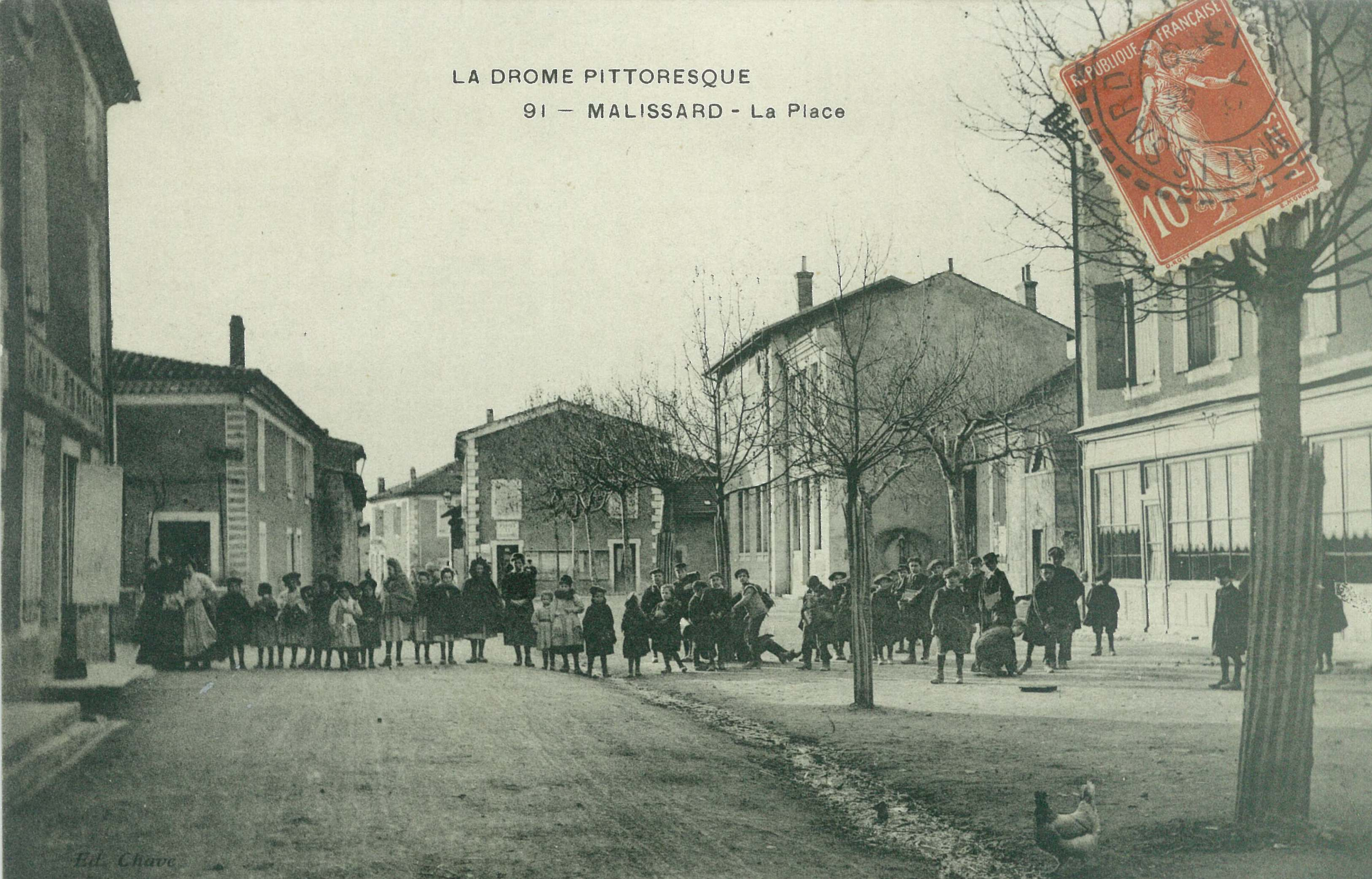 Vue de la place principale du village de Malissard (Drôme). La photo représente la place avec ses maisons, sa rue principale traversant le village et un ensemble d'enfant de l'école du village